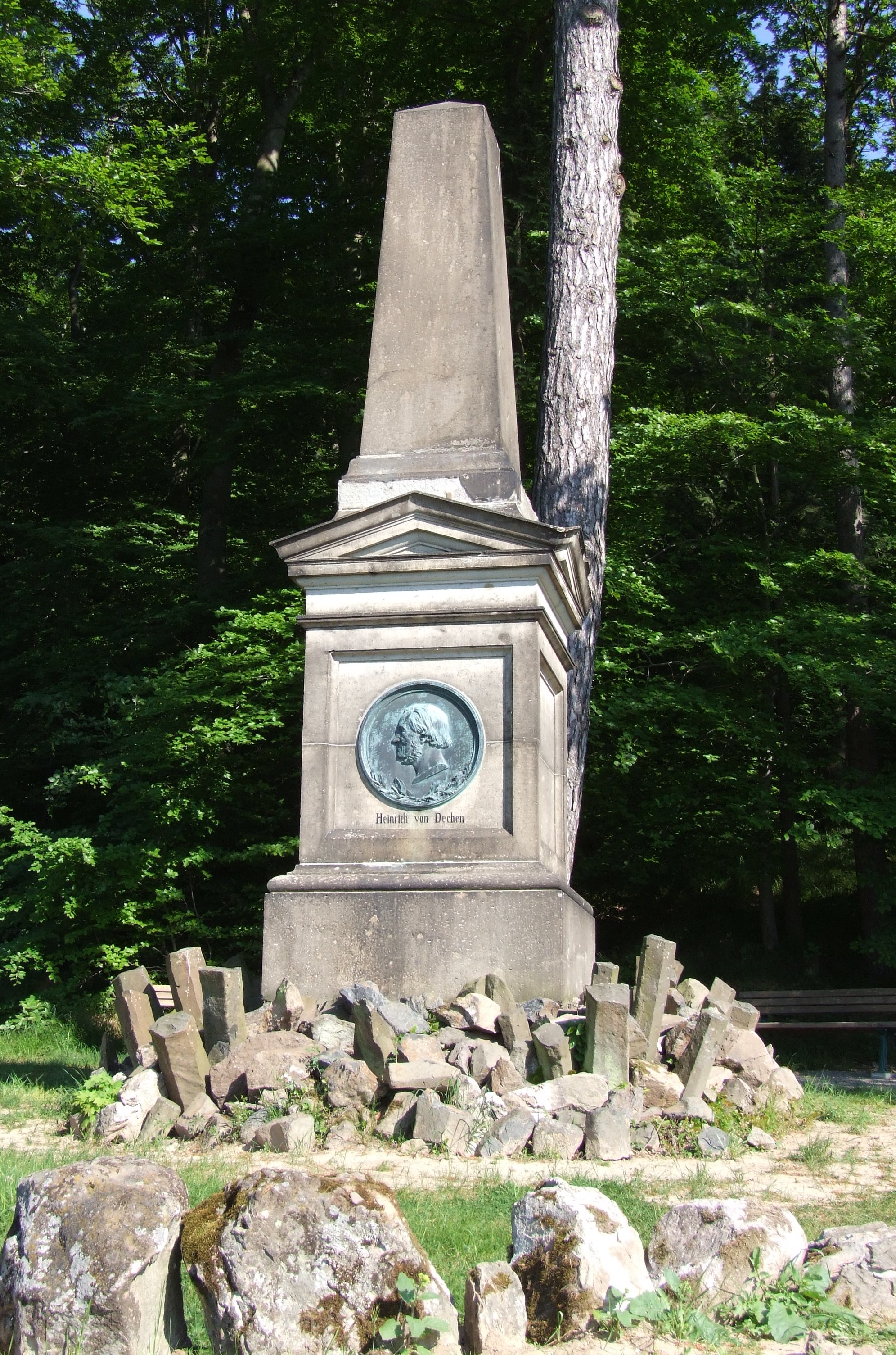 Das Denkmal für den ersten Vorsitzenden des VVS (1870–1889) Heinrich von Dechen, steht am Kutschenweg zum Drachenfels